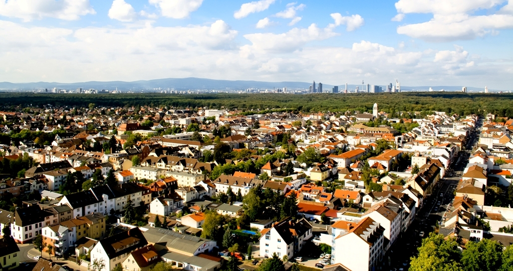 Foto: Samra Babalija (Aufnahme vom Hochhaus des Isenburg Zentrum mit Blick auf Westen von Neu-Isenburg und Frankfurter Straße